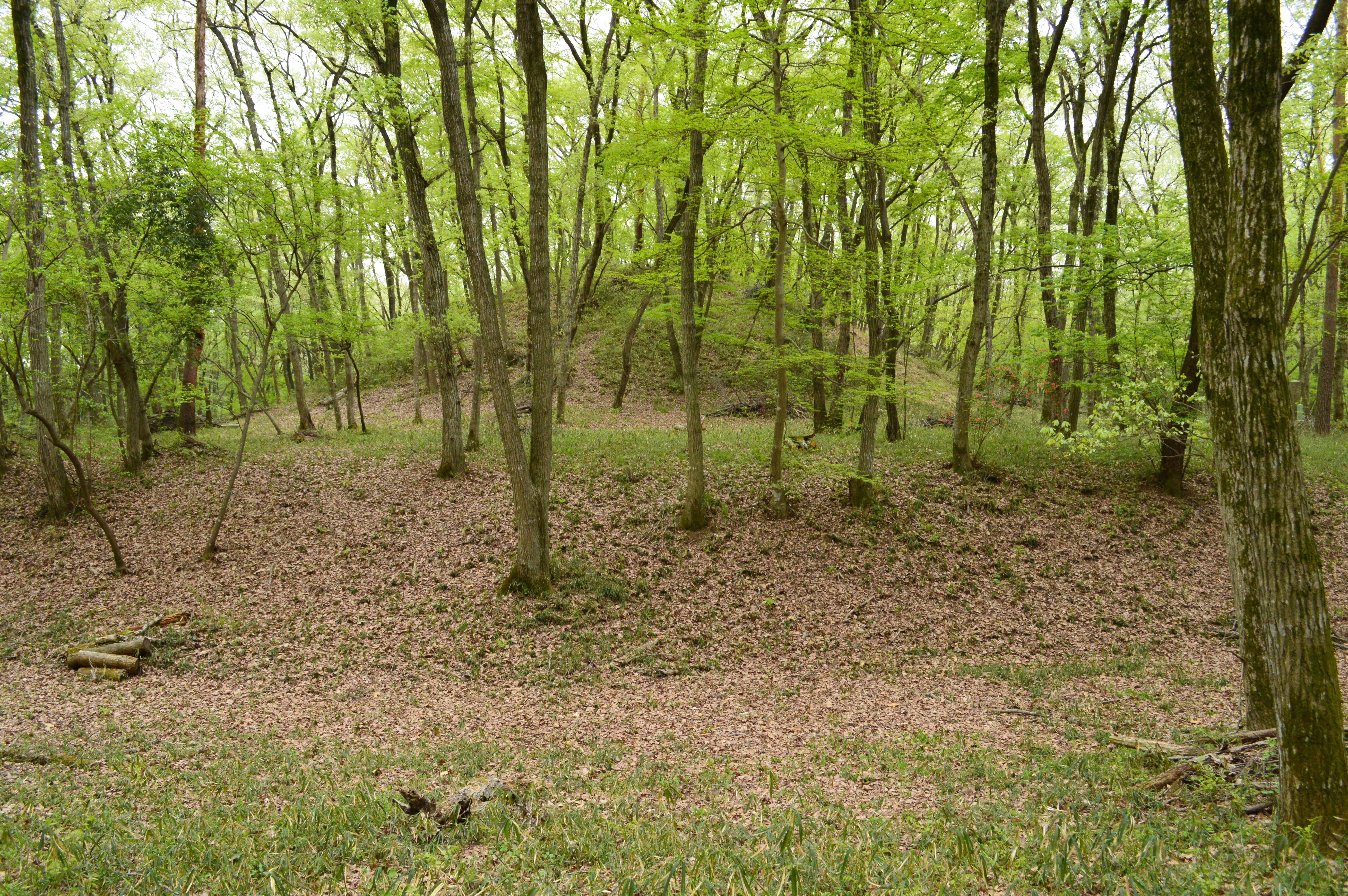 吾妻古墳 基壇